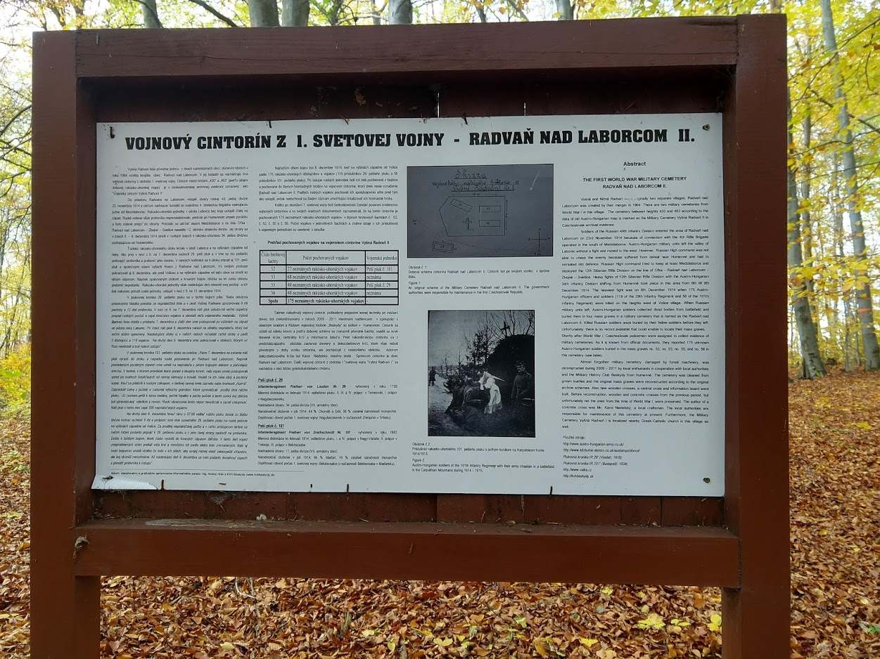 Tabuľa na vojenskom cintoríne z 1. svetovej vojny nad Volicou. Je tu pochovaných 175 vojakov.